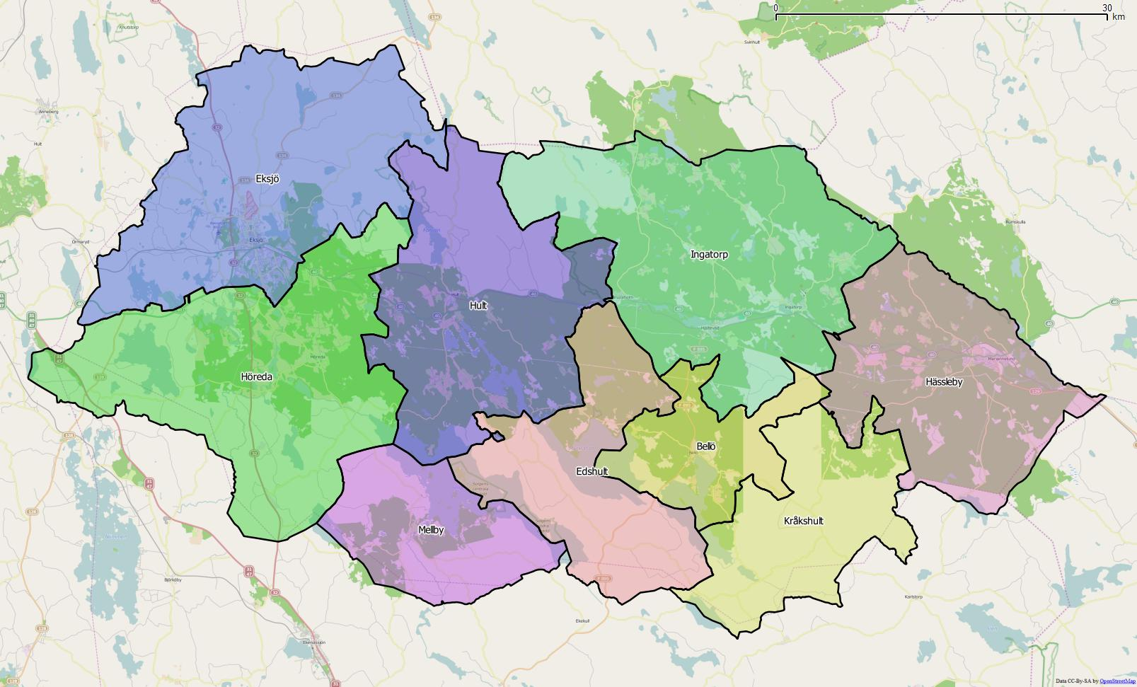 Distriktsindelningen i Eksjö kommun